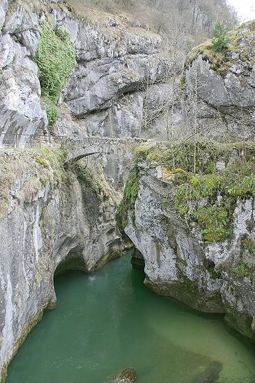 Pont Saint Martin, appelé improprement "Pont romain" dans le débouché des gorges du Guiers Vif, limite entre Saint Christophe sur Guiers Isère et Saint Christophe Savoie, France